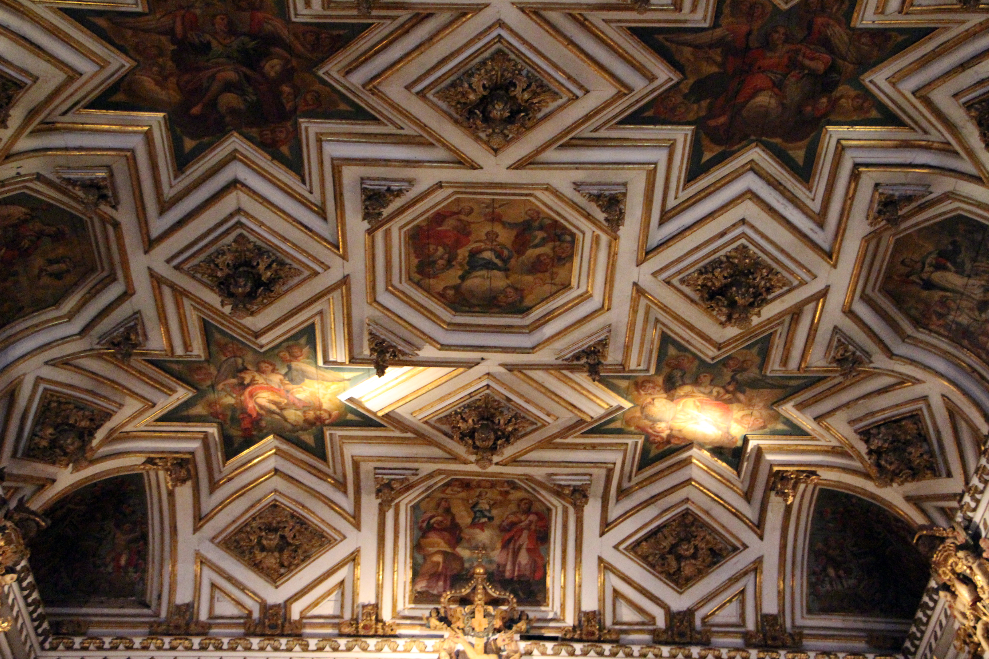 Igreja de São Francisco (Salvador)